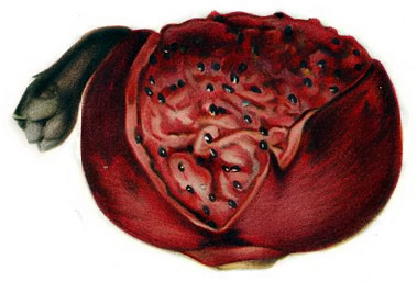 Cephalocereus deeringii (fruit)